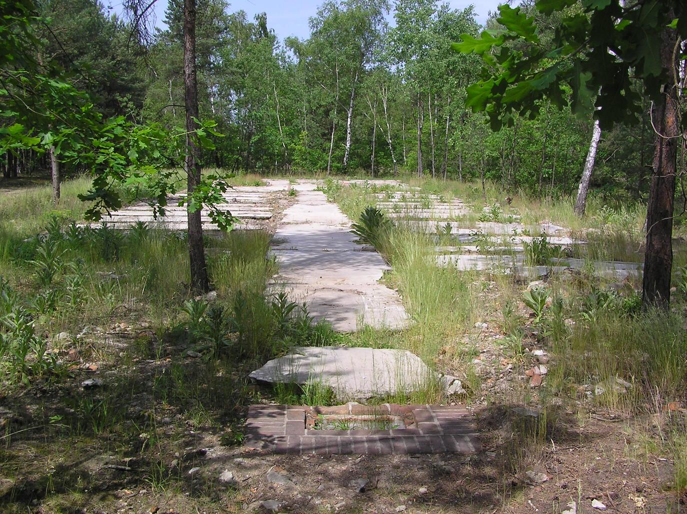 Stalag Luft III, Stalag VIII C Sagan